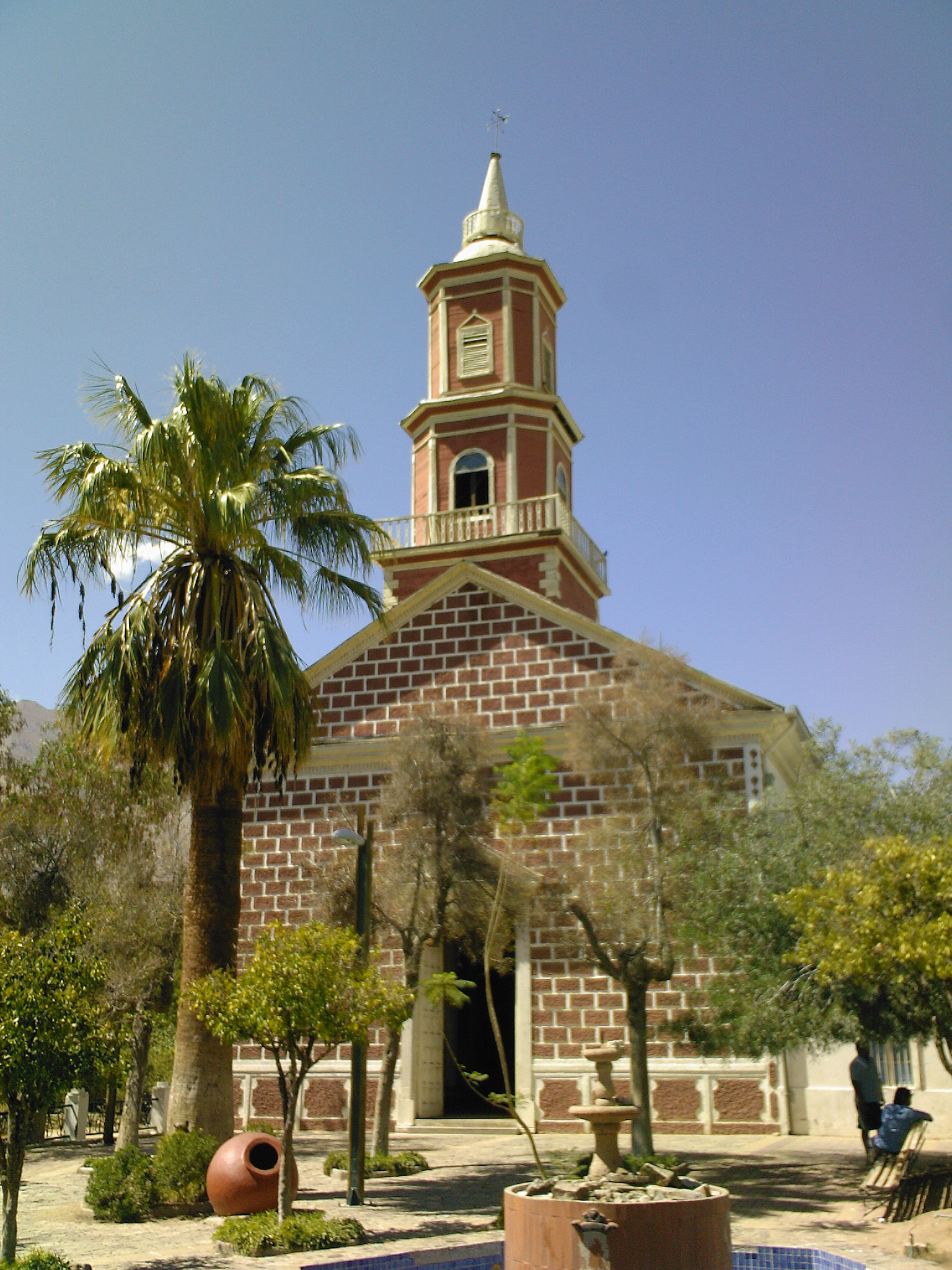 Vista de la iglesia de Montegrande This is a photo of a national monument in Chile: 357